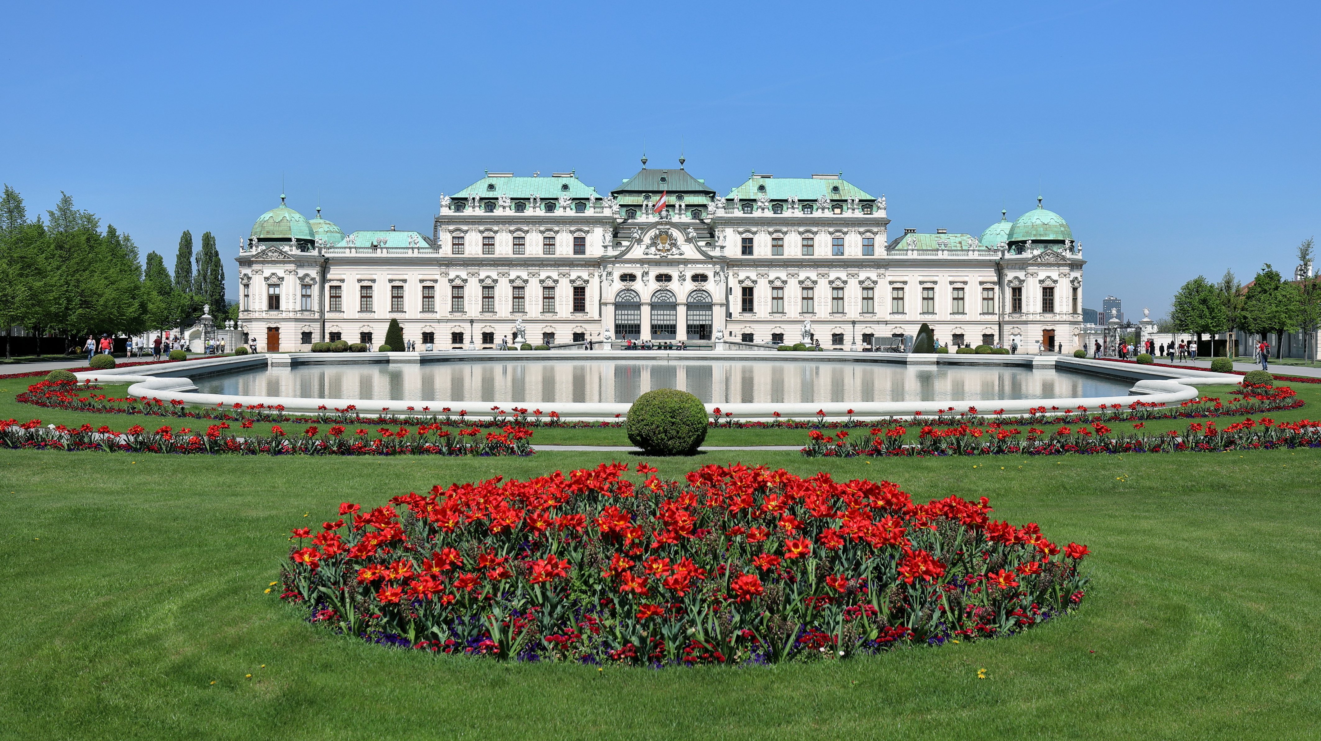 Südansicht des oberen Belvederes im 3. Wiener Gemeindebezirk Landstraße.Die barocke Schlossanlage ließ Prinz Eugen von Savoyen nach Plänen von Johann Lukas von Hildebrandt errichten. Das obere Belvedere diente ihm als Repräsentations- und Festschloss und wurde von 1717 bis 1723 gebaut. Zuvor ließ er von 1712 bis 1716 das untere Belvedere als Sommerwohnsitz errichten. Aktuell (2018) wird das untere Belvedere als auch das obere von der Österreichischen Galerie Belvedere genutzt.